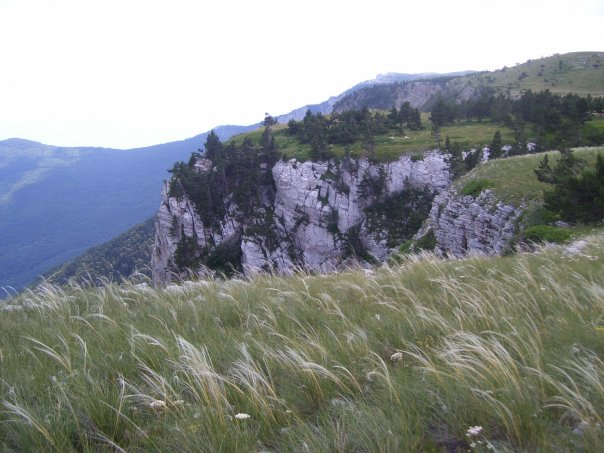 Cr-4Краєвид з Плато Ай-Петрі